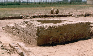 Restos históricos en Villoria de órbigo (León, Castilla y León).